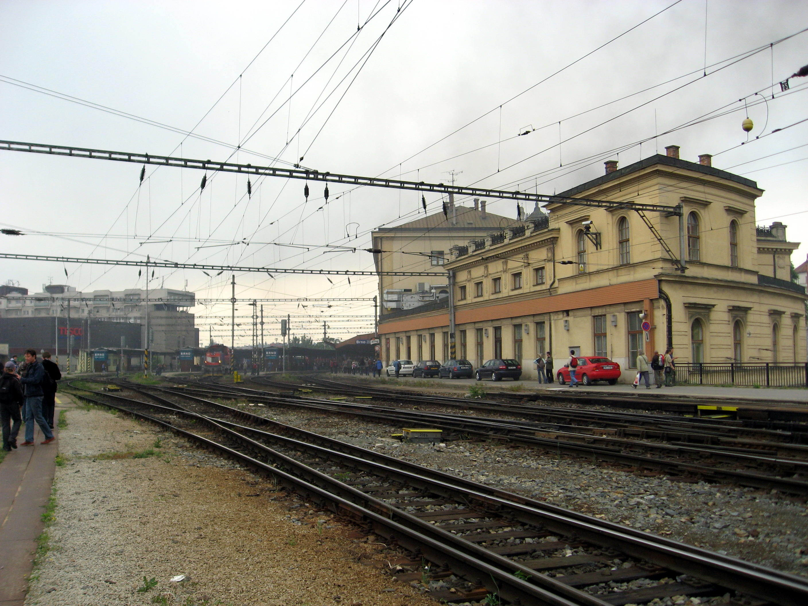 Vlakové nádraží v Brně po výjezdu parní lokomotivy